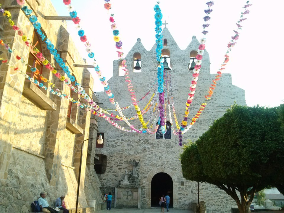 Vista de frende de la catedral Ex Convento de San Agustin